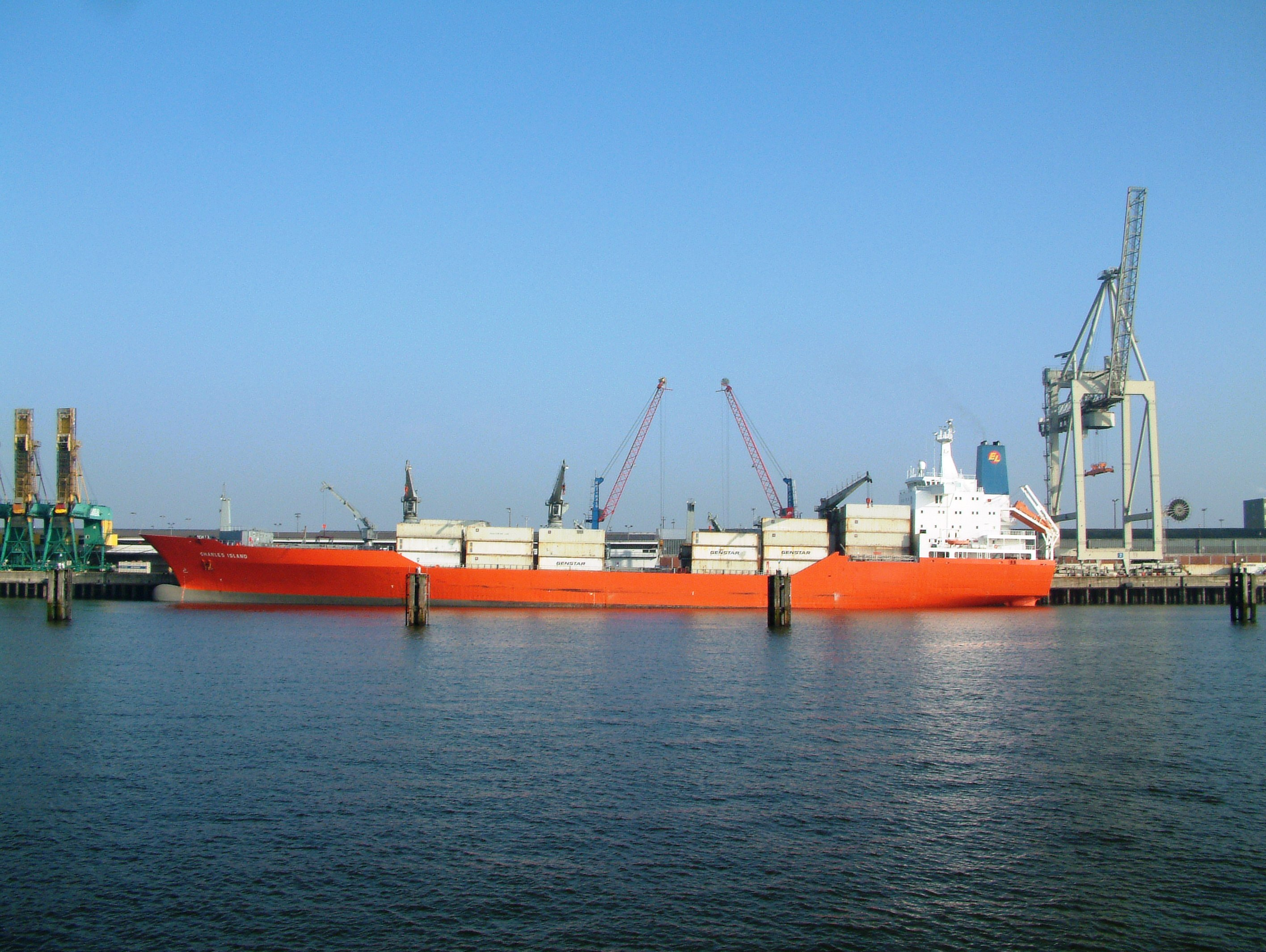 Charles Island Island Klasse, Kühlschiffe mit Ammoniak als Kältemittel (Foto: Ursula Horn) IMO Number: 9059626 MMSI Number: 308705000 Callsign: C6JT Length: 180 m Beam: 25 m